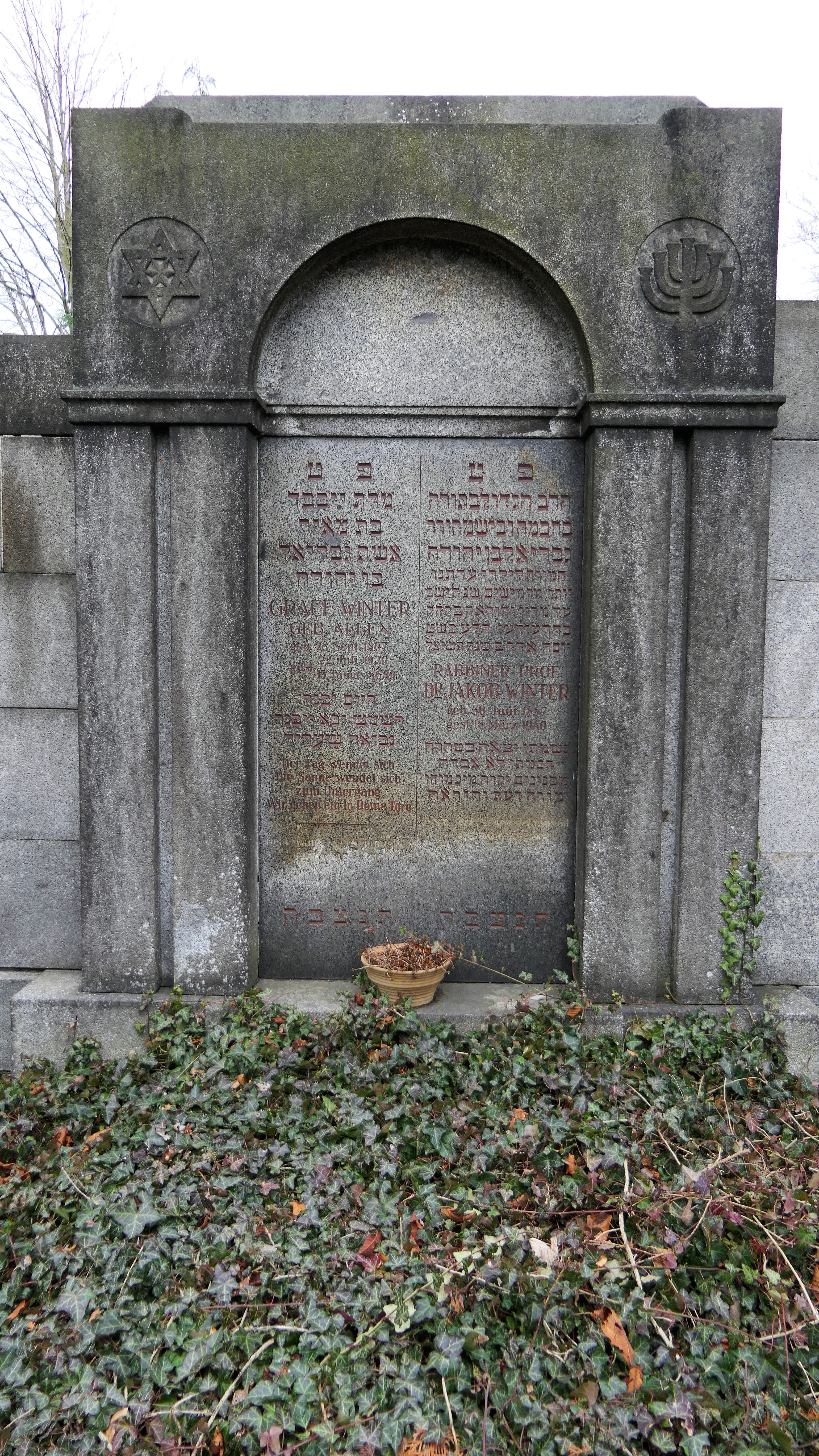 Grab von Prof. Dr. Jakob Winter, Neuer Jüdischer Friedhof Dresden